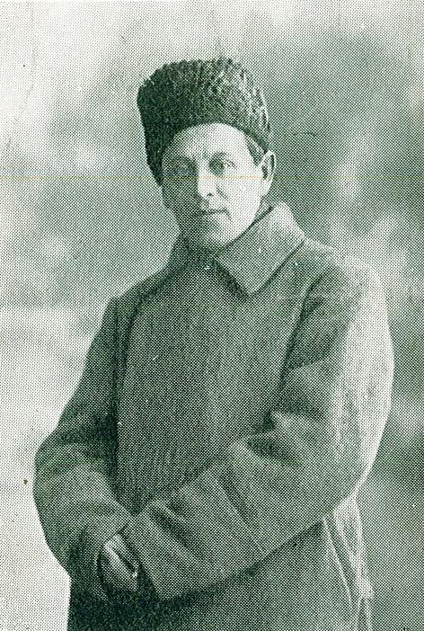 Листвіка. Напис під знимкою: "Любому помічнику по праці в справі будування Вільної Самостійної України Ю. Гасенкові од прихильного до нього С. Петлюра" (25.V(?).1917). На звороті заголовок: "Bureau Ukrainien de la presse en Roumanie" нижче коротка біографія С. Петлюри французькою мовою